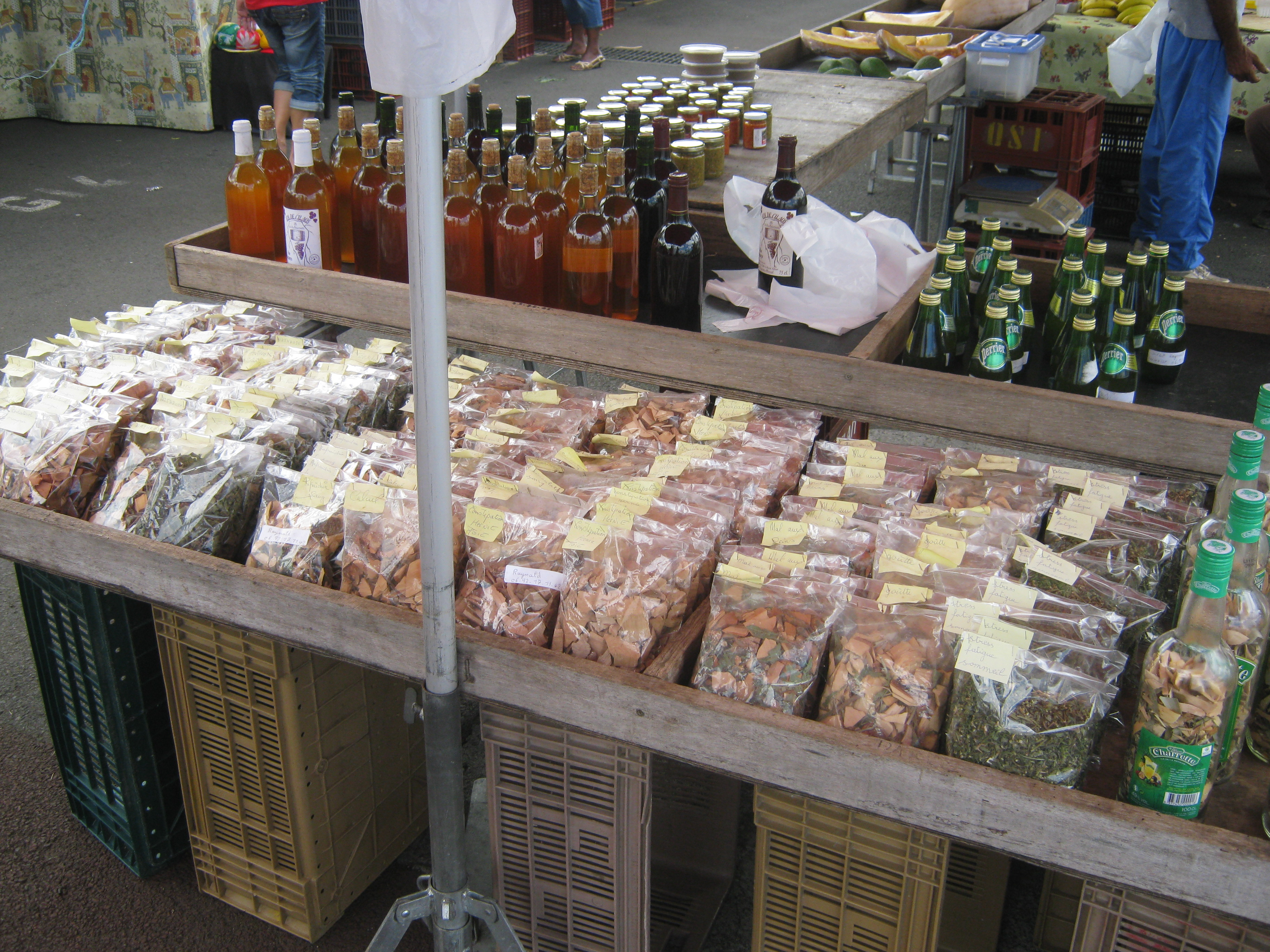 On voit également ici des tisanes en bouteille déjà prêtes.